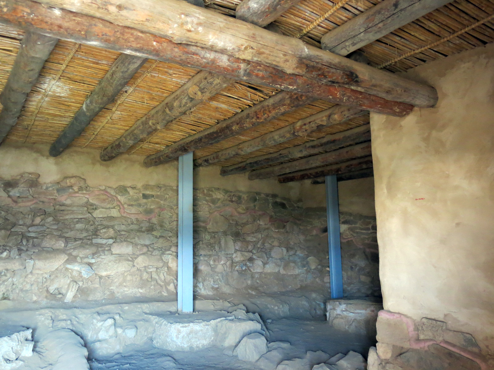 Poblat ibèric de Puig Castellar, habitatge reconstruït